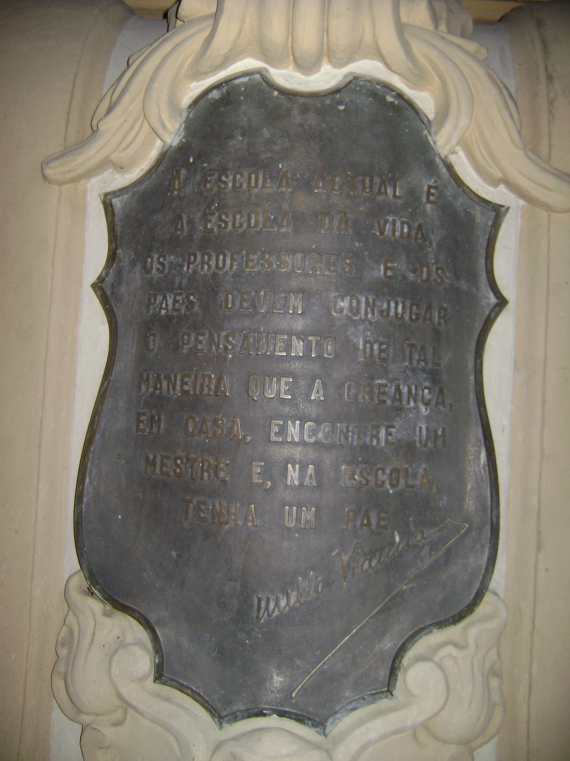 Citação de Mello Vianna na entrada do Grupo Escolar Pedro II, em Belo Horizonte, Brasil: "A escola actual é a escola da vida. Os professores e os paes devem conjugar o pensamento de tal maneira que a creança, em casa, encontre um mestre e, na escola, tenha um pae"